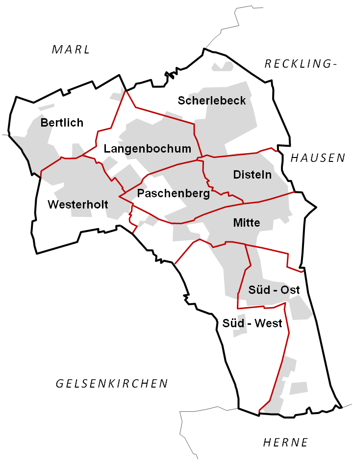 Stadtteilkarte mit Flächennutzung - Herten, Nordrhein-Westfalen, Deutschland